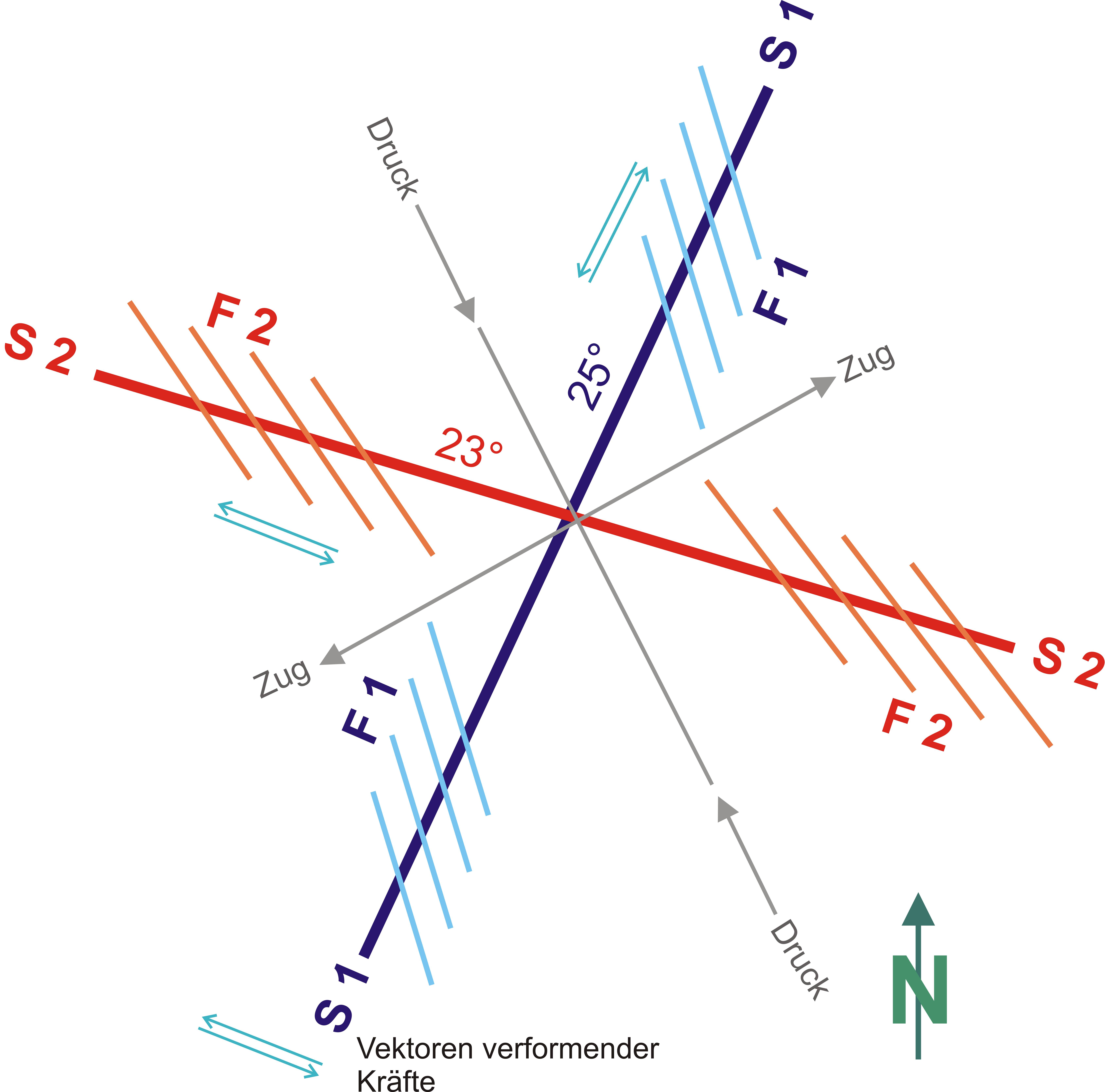 Tektonisches Strukturschema des Freiberger Gangspaltensystems (Umzeichnung nach BAYER)